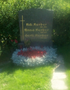 Südwestfriedhof Wien-Adi Berber